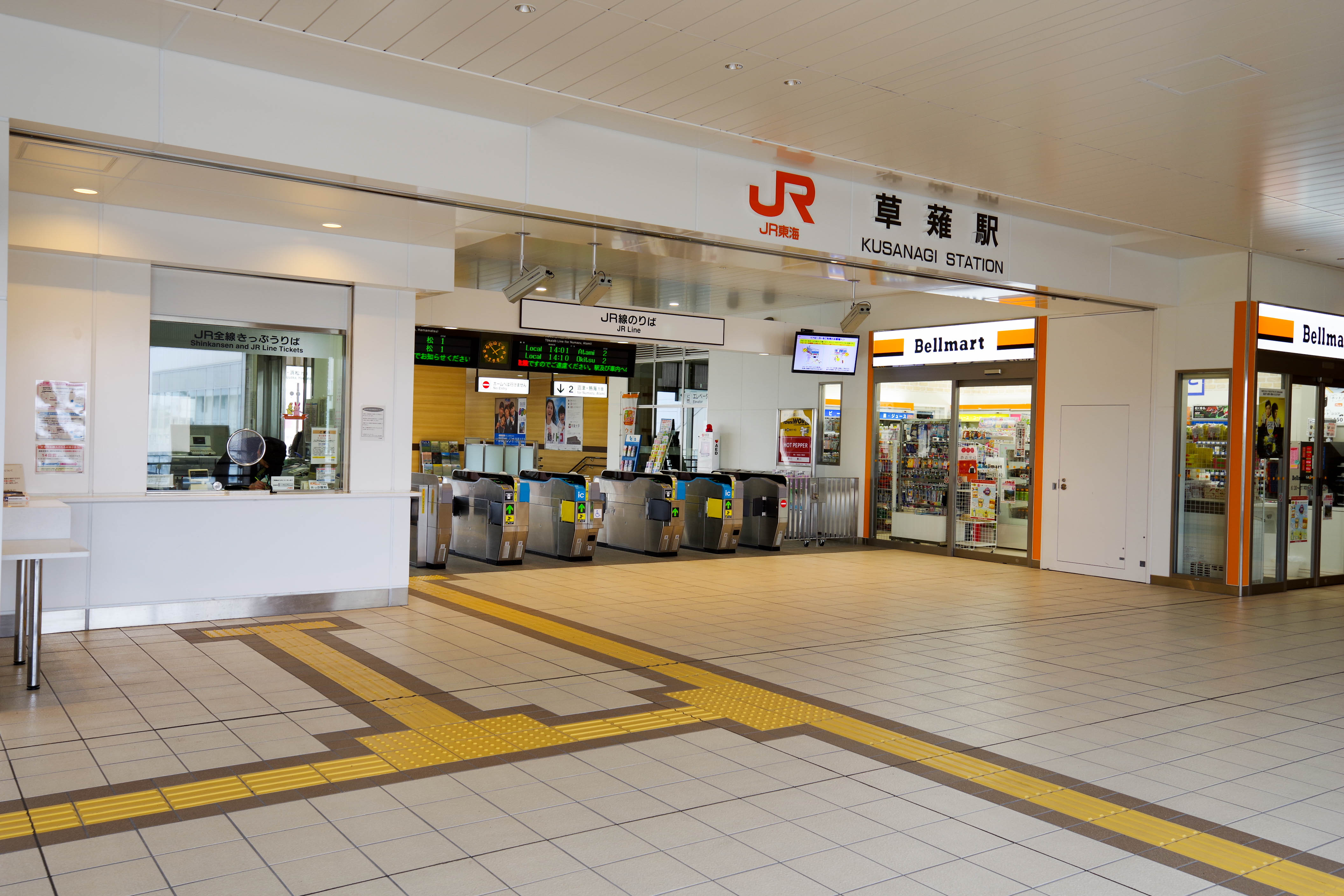 東海旅客鉄道株式会社東海道本線草薙駅改札口付近